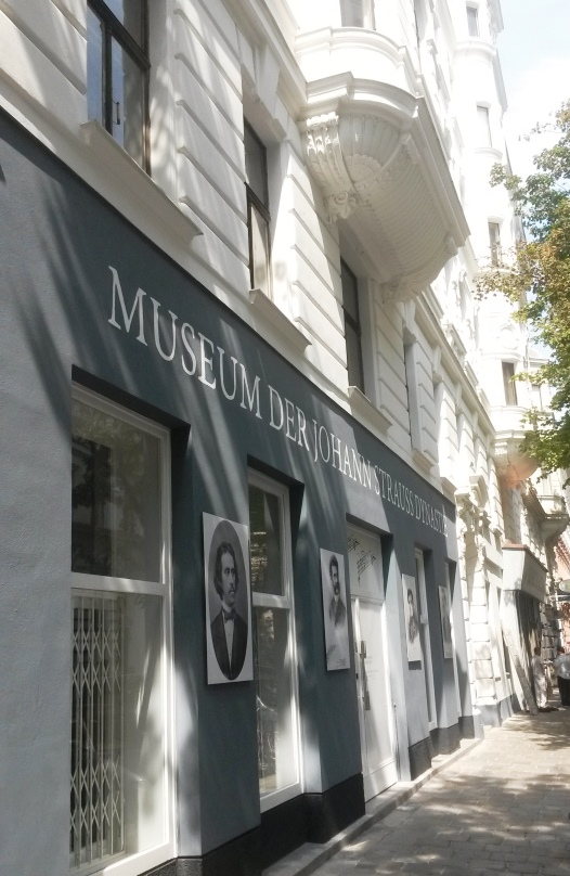 Fassade des Johann Strauss Museums, 1090 Wien, Müllnergasse 3.